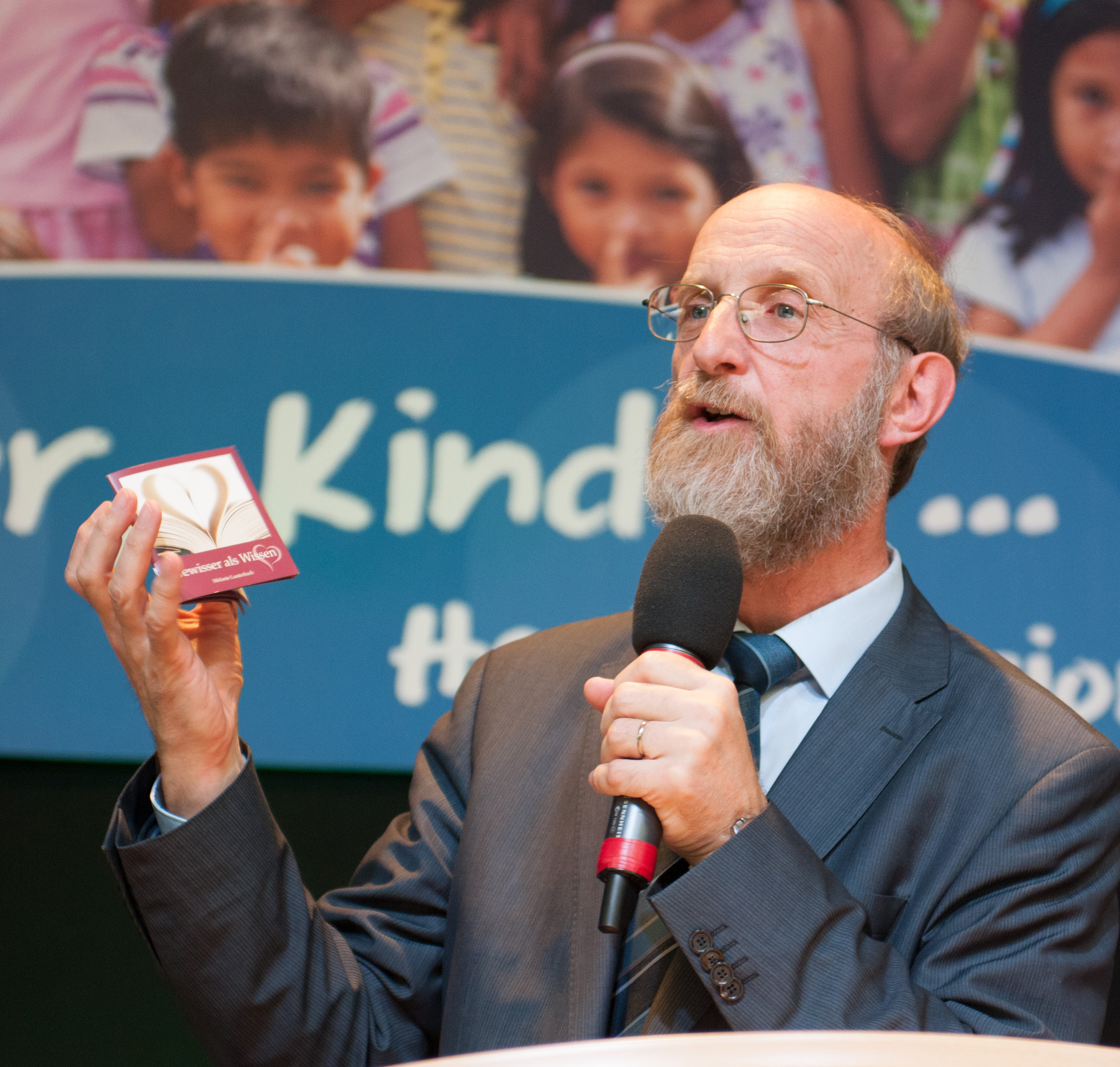 DMG-Direktor Dr. Detlef Blöcher (Sinsheim) beim Herbstmissionsfest im September 2014